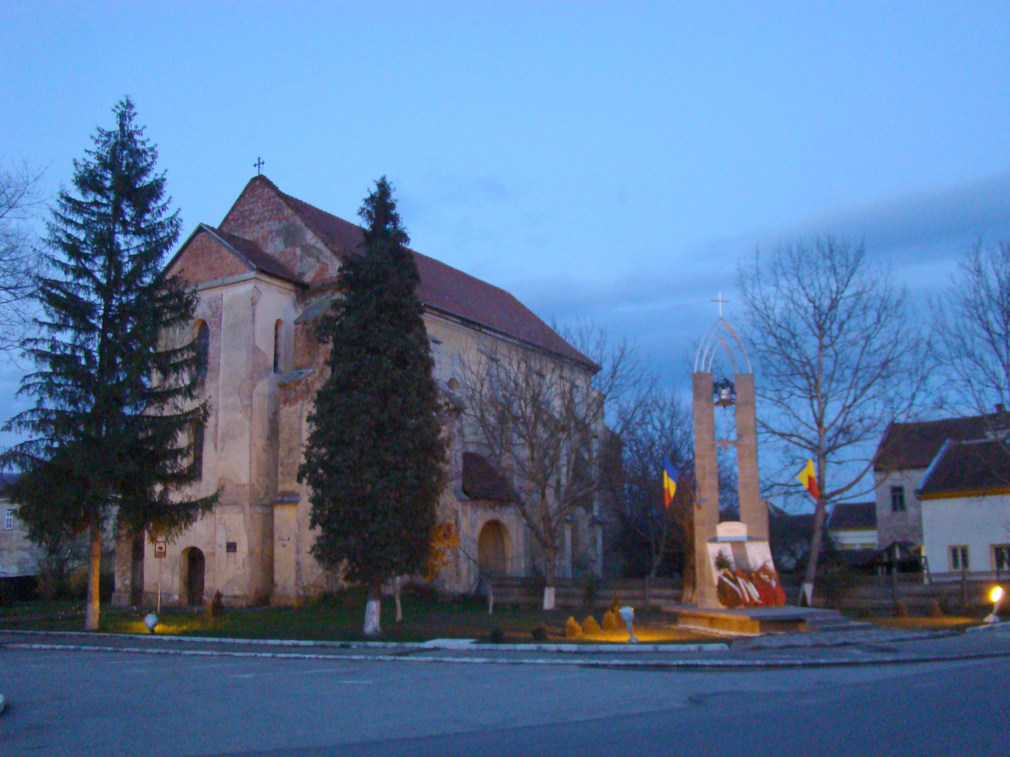 Mănăstirea franciscană, sat BAIA DE CRIŞ; comuna BAIA DE CRIŞ